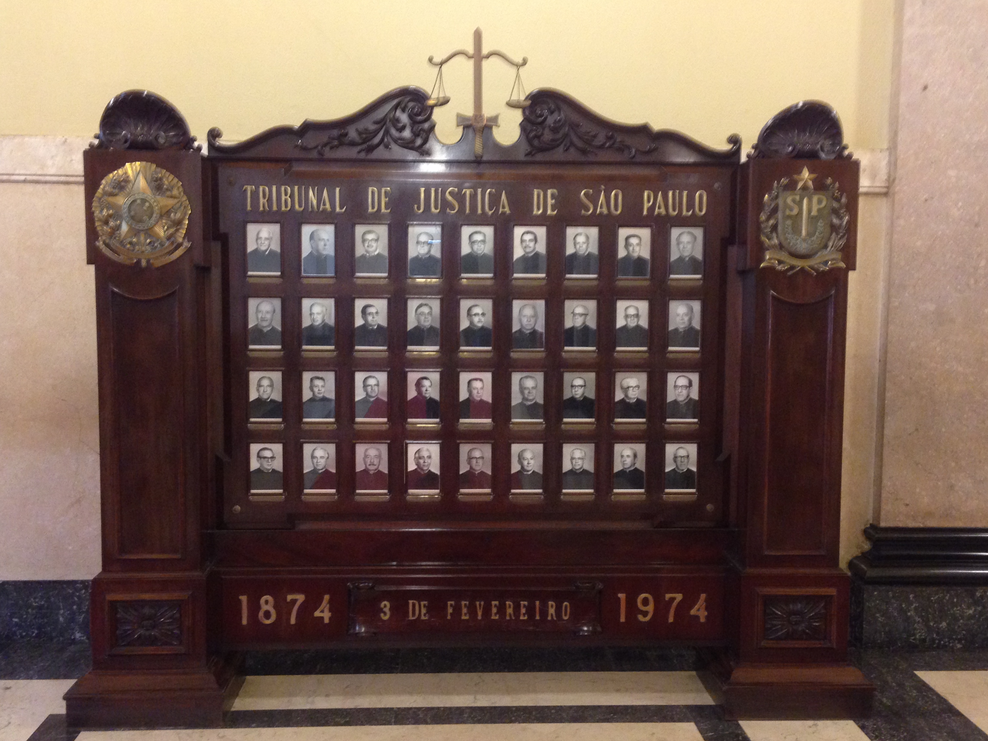 Painel com fotografias de membros do Tribunal de Justiça de São Paulo, localizado no interior do Palácio da Justiça, em São Paulo (SP), Brasil